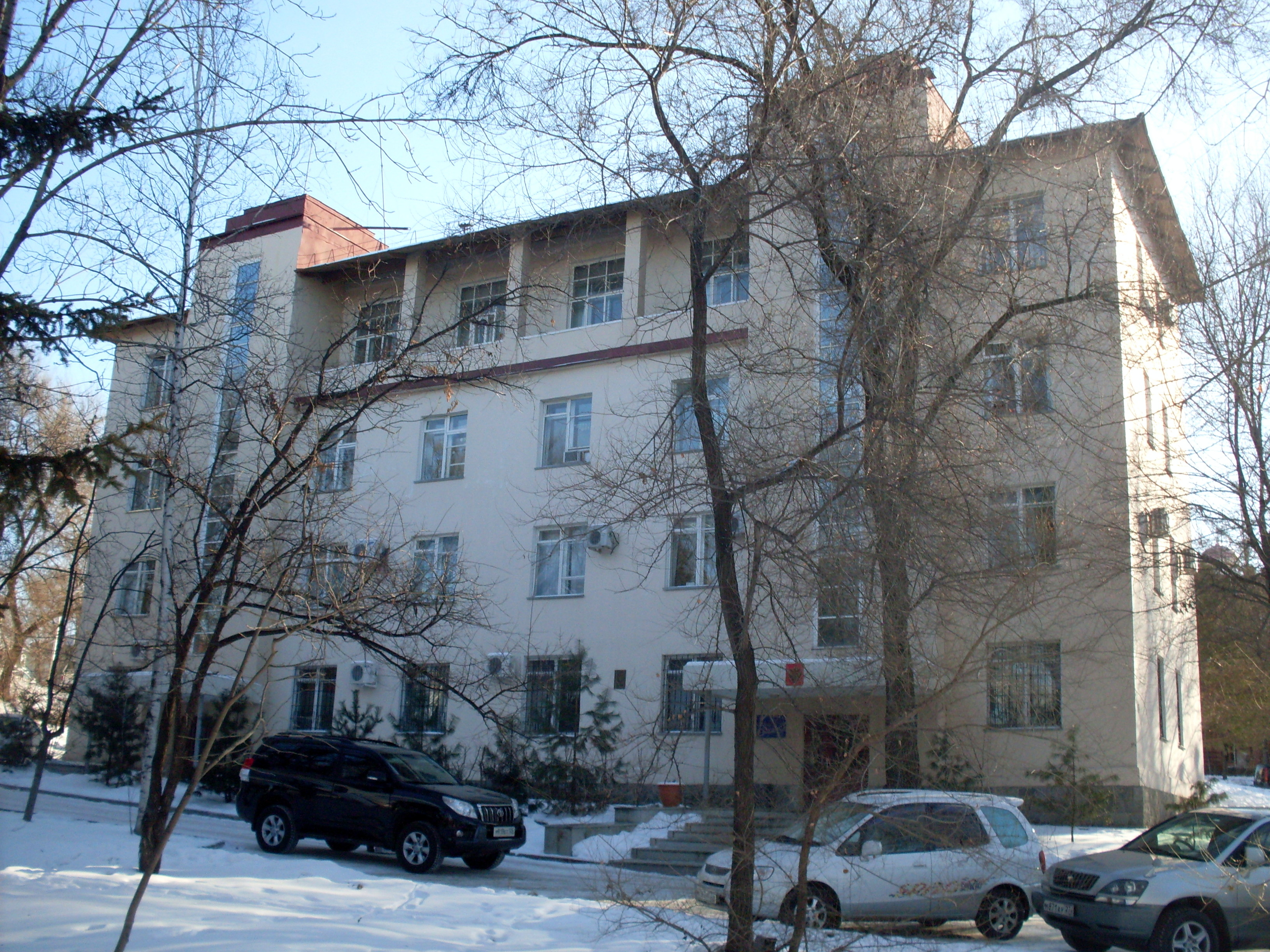 Дом Товарищества работников газеты "Тихоокеанская звезда", 1928 года постройки. Хабаровск.